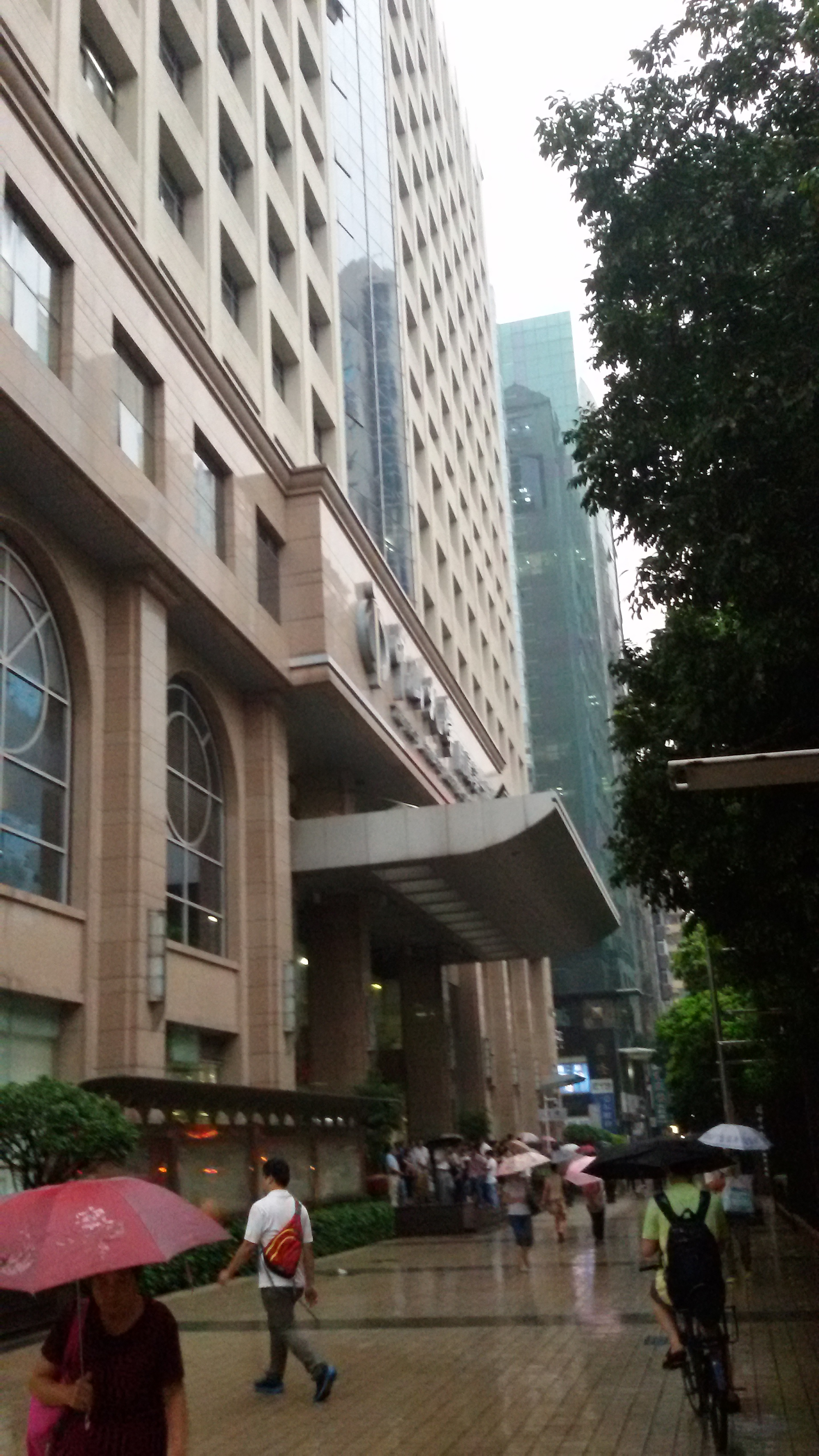 粵語: 中山大学附属第一医院（东山总院）门口附近